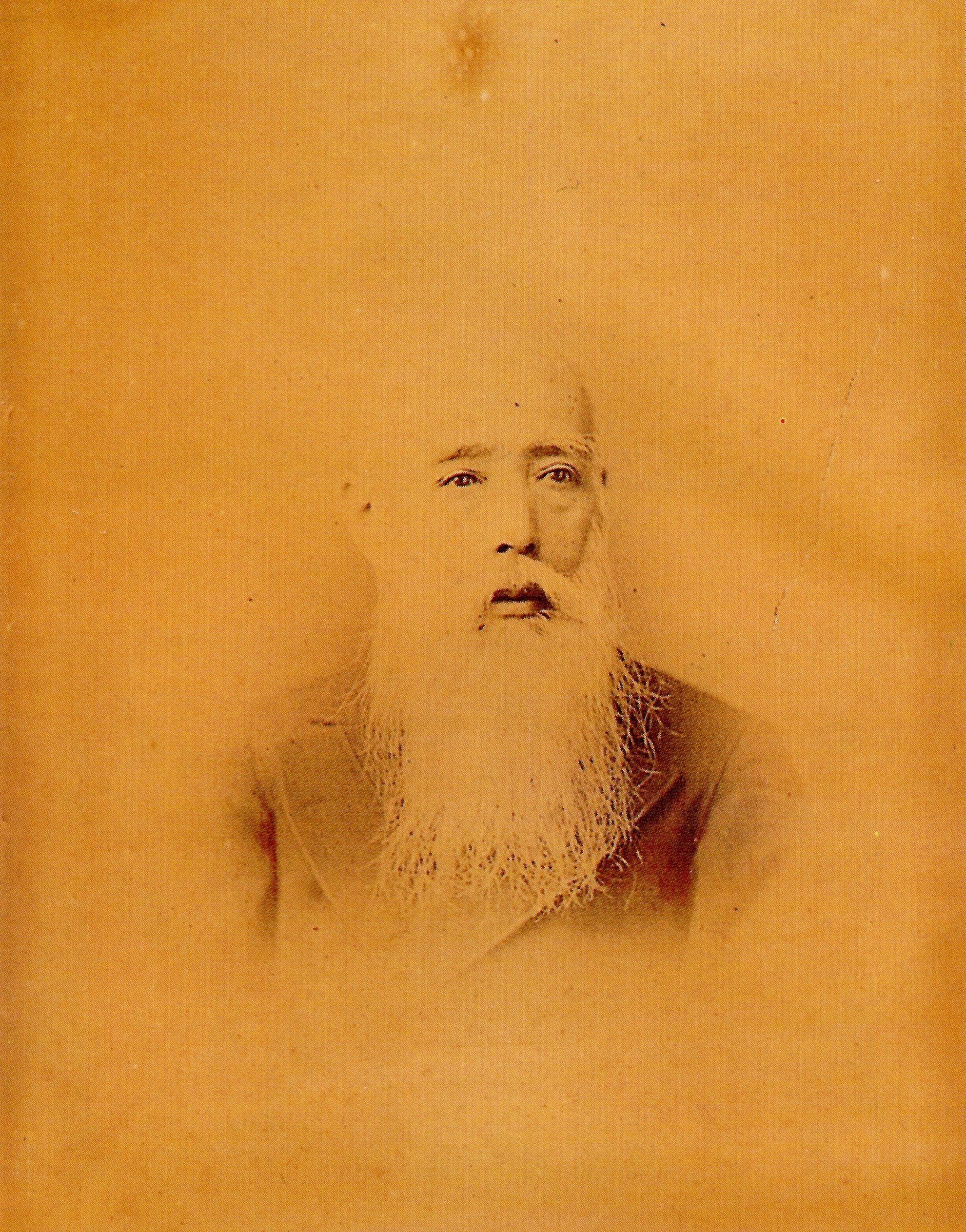 Kuroda Nagahiro, daimyo of Fukuoka 黒田長溥